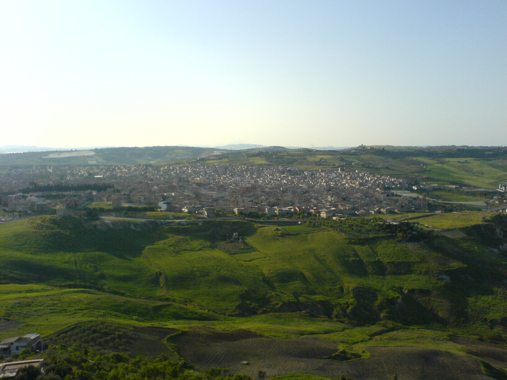 Vista dal Monte Saraceno